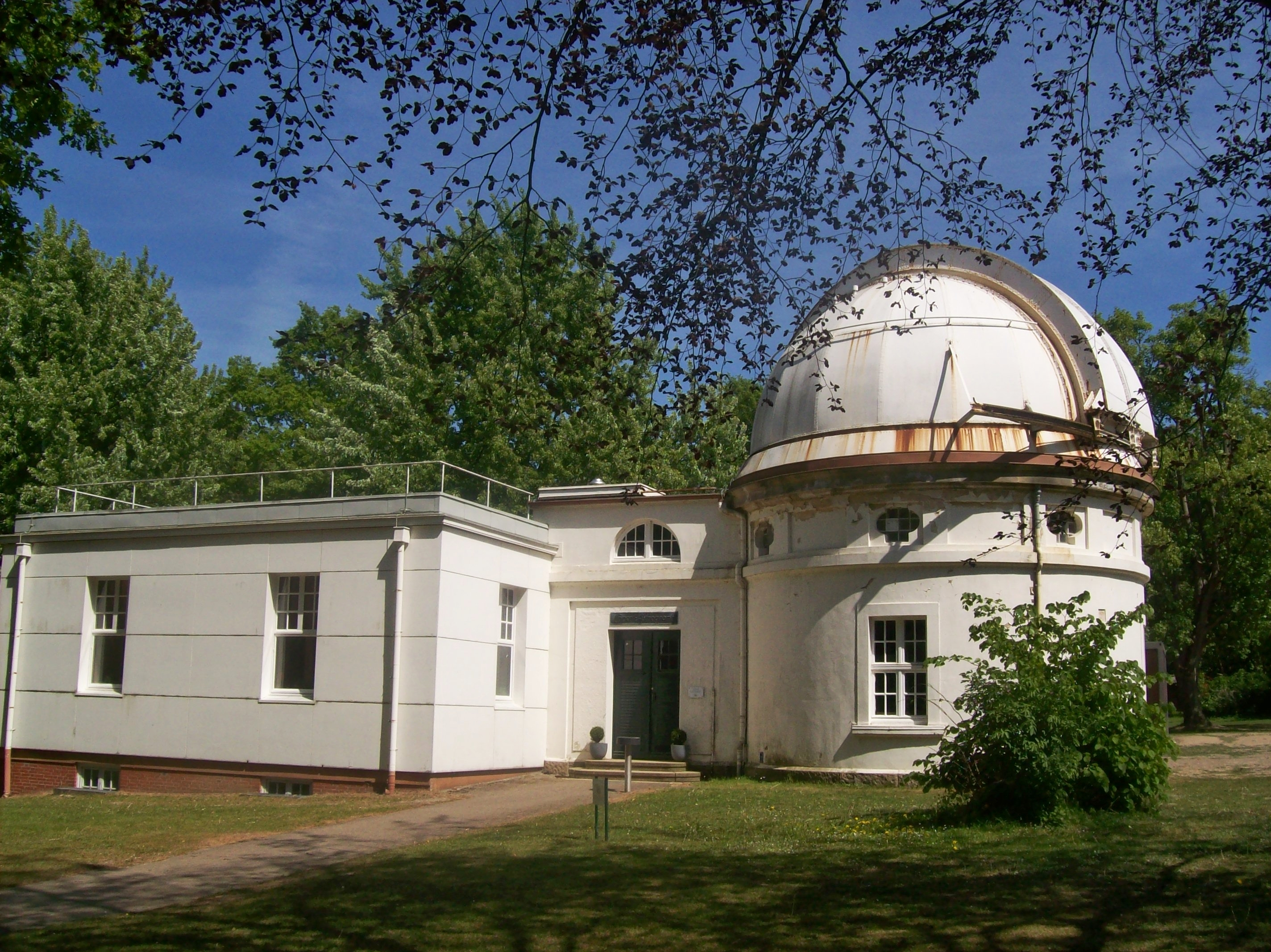 Sternwarte Bergedorf, Hamburg, Germany